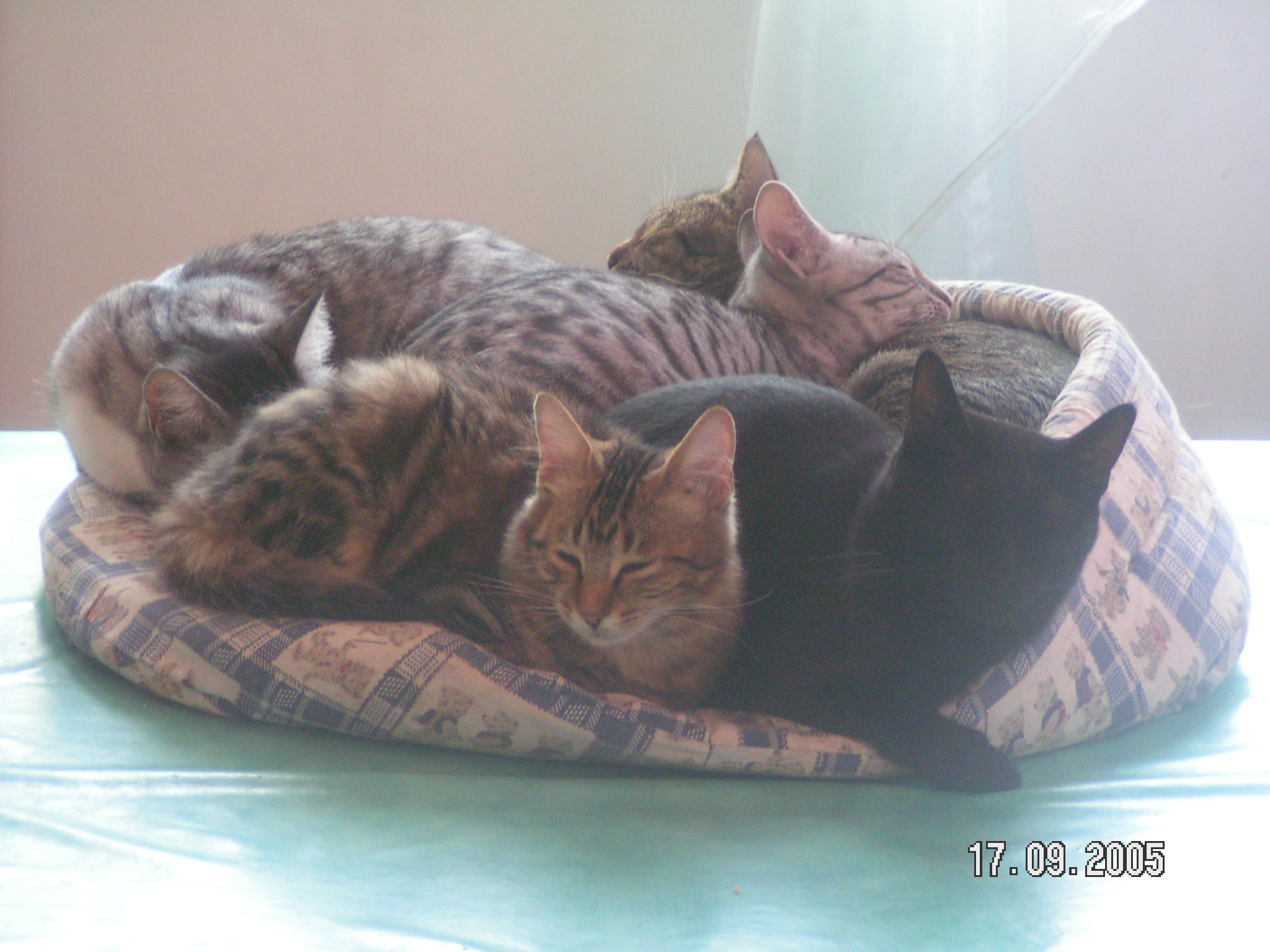 Panier plein de chats